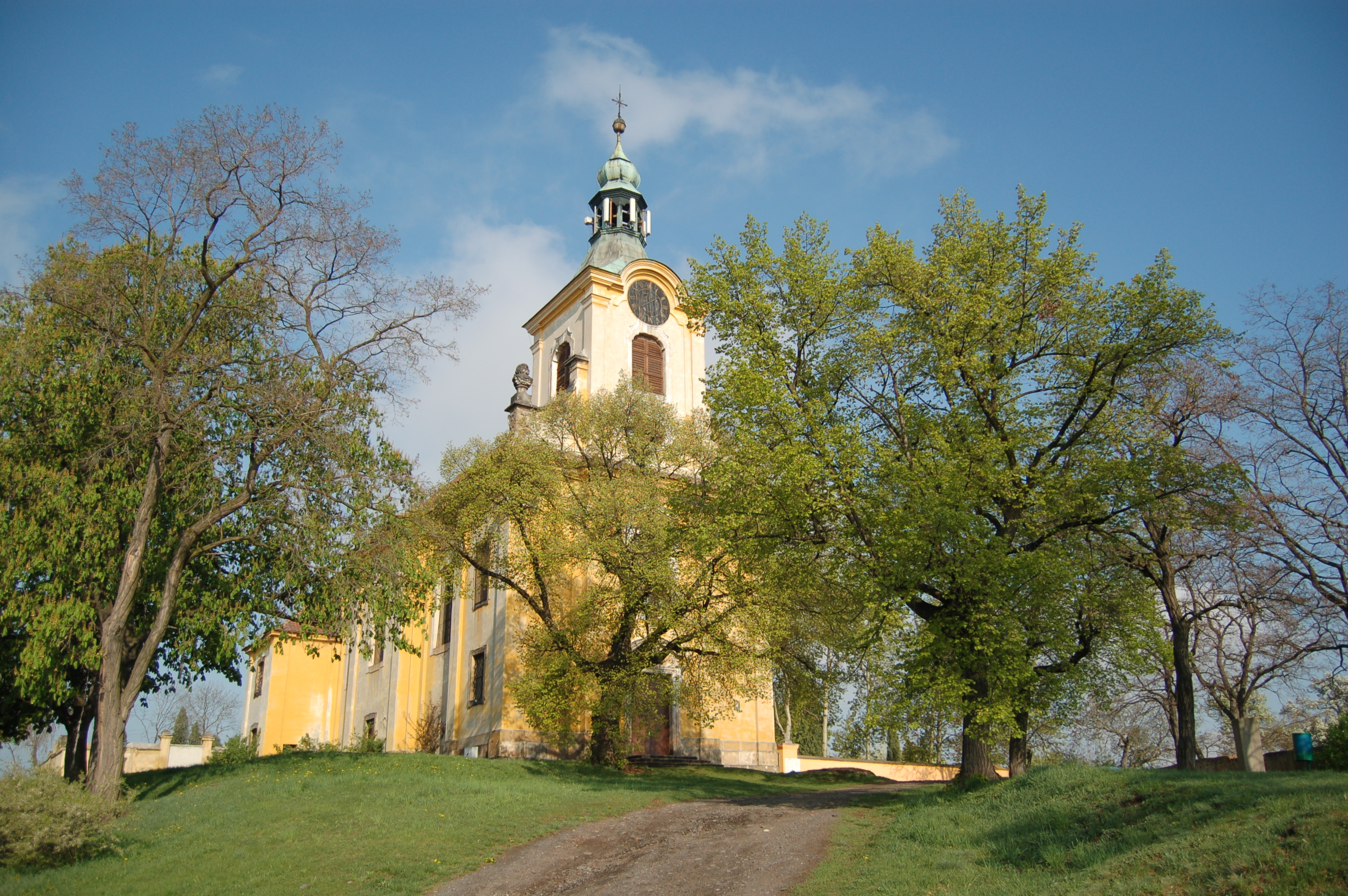 Kirche in Vtelno (Wteln) bei Most (Brüx) in Tschechien.